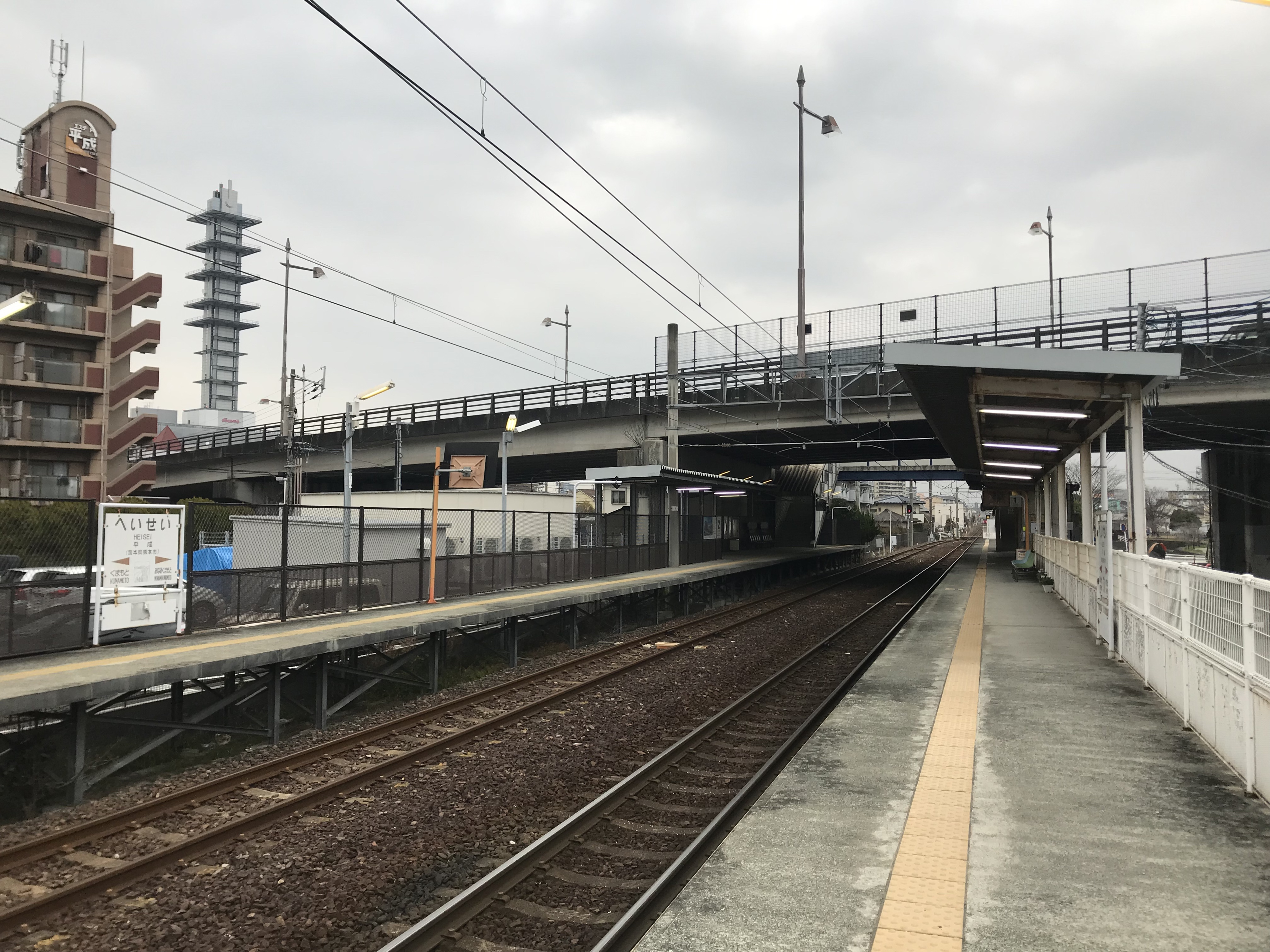 平成駅のホーム(奥は南熊本方面)